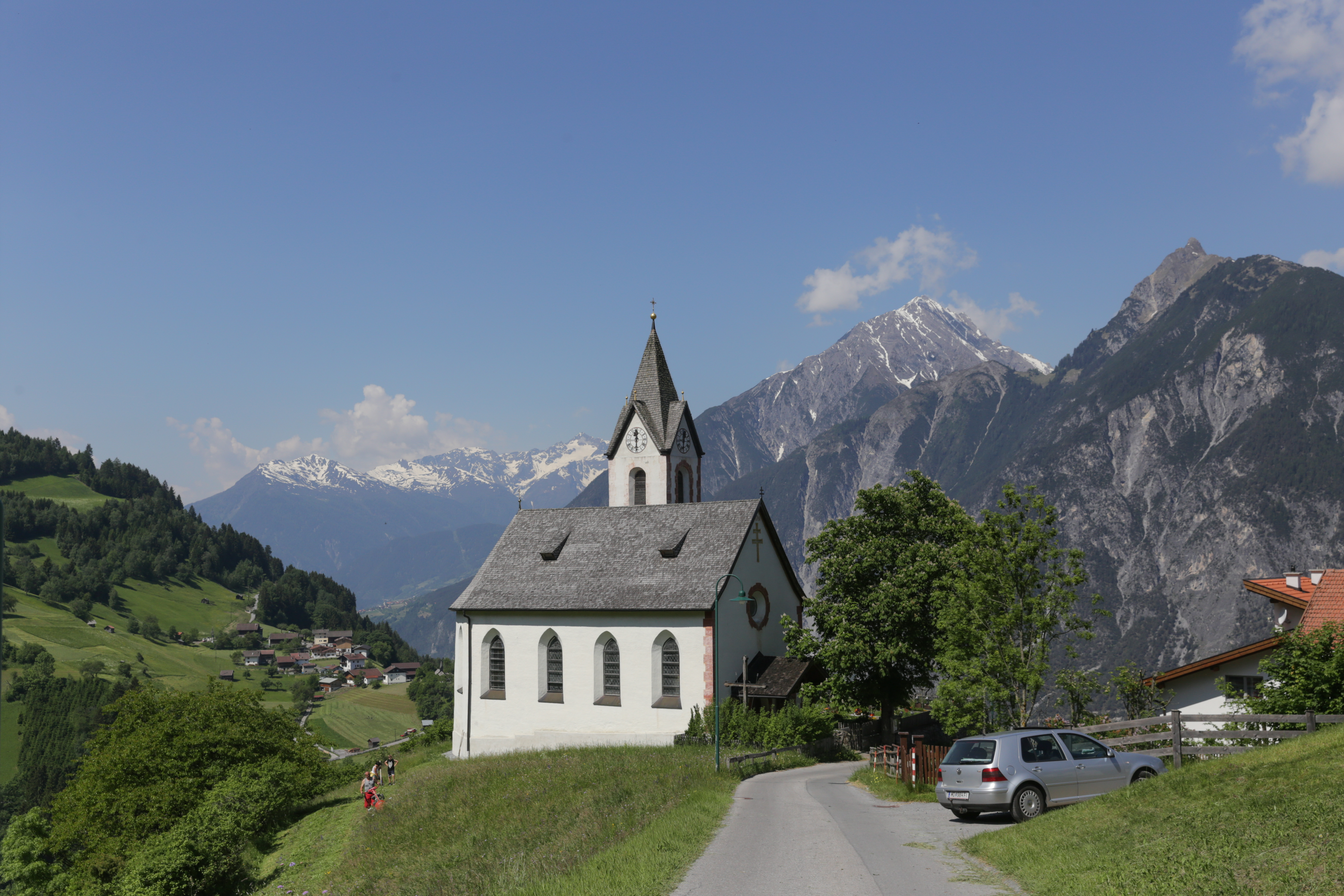 AT 65034 Expositurkirche Mariä Reinigung (Falterschein), Zams, Tirol